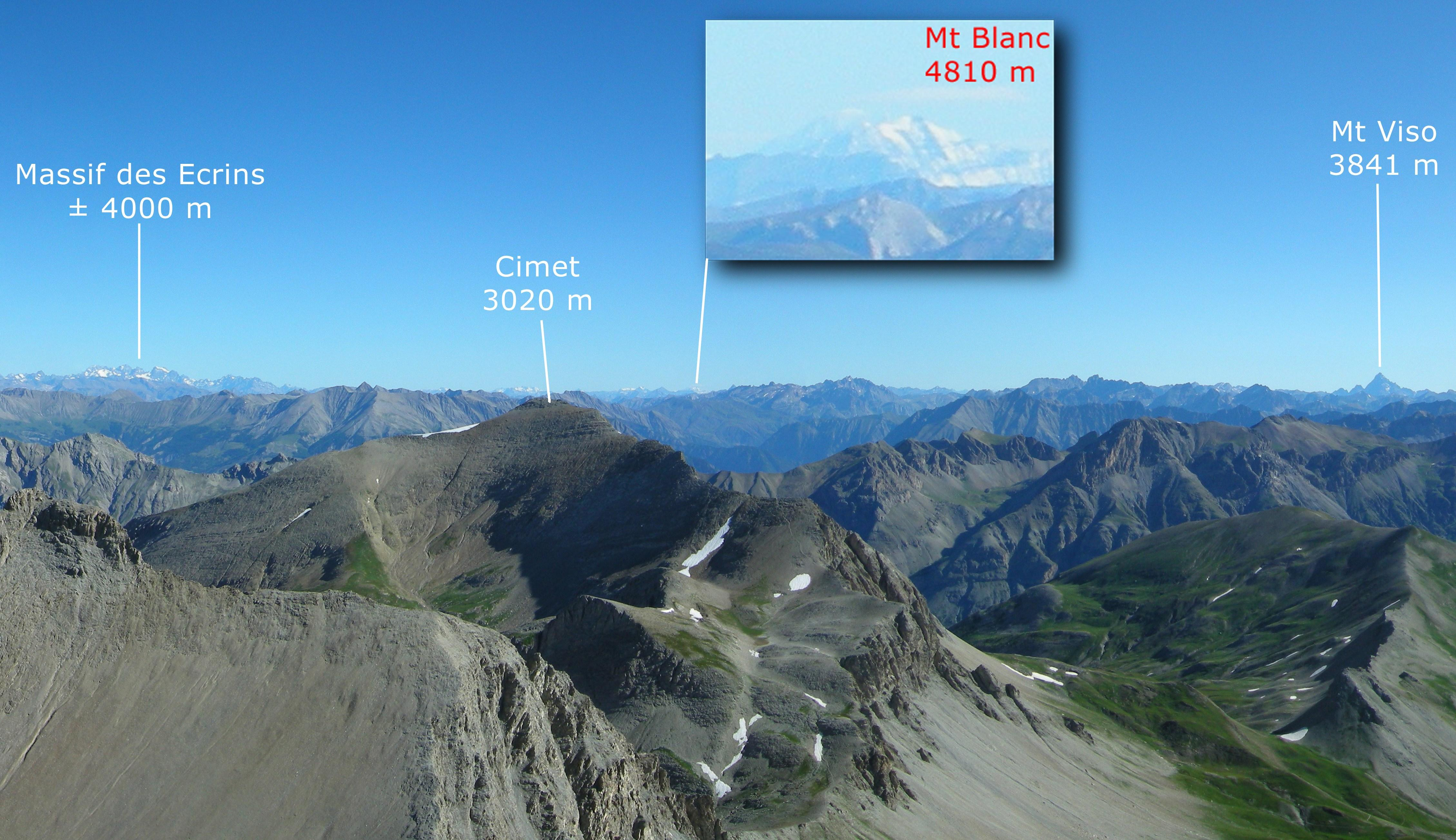 Du Mont-Pelat (3052 m) vue vers le nord du massif des Ecrins (4102 m) au Mont-Viso (3841 m)